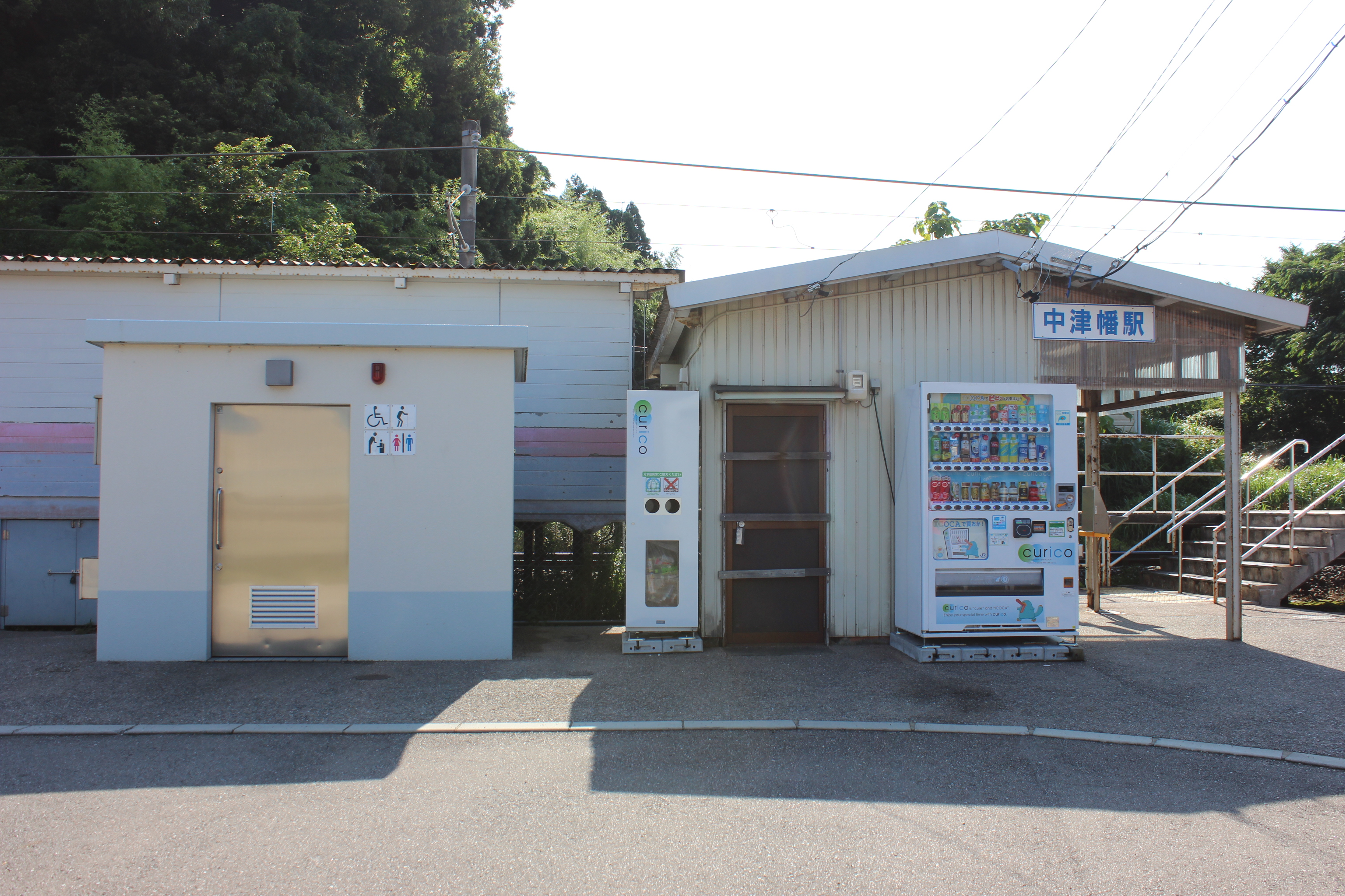 中津幡駅（石川県河北郡津幡町） Canon EOS Kiss X5